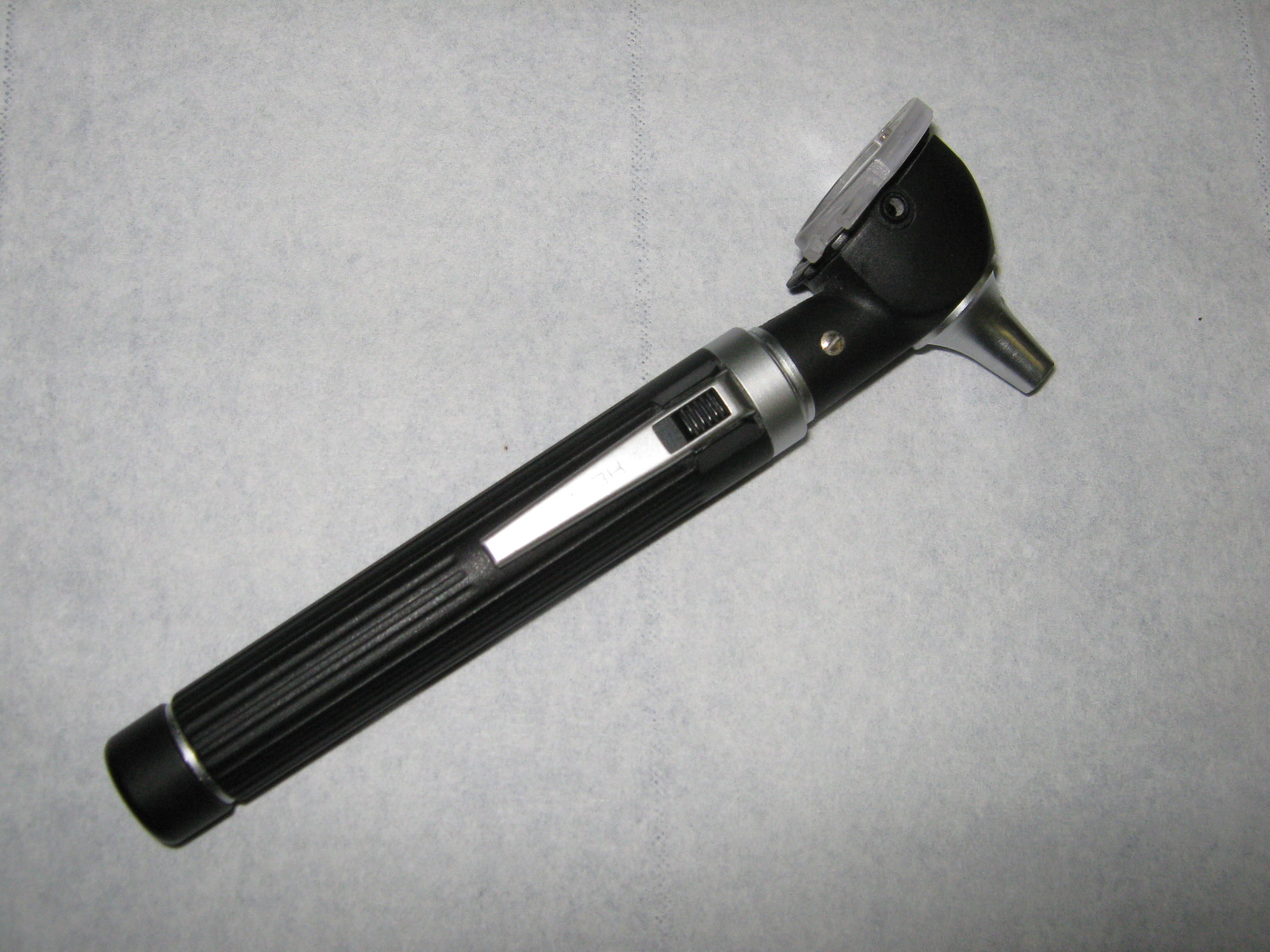 Otoscope